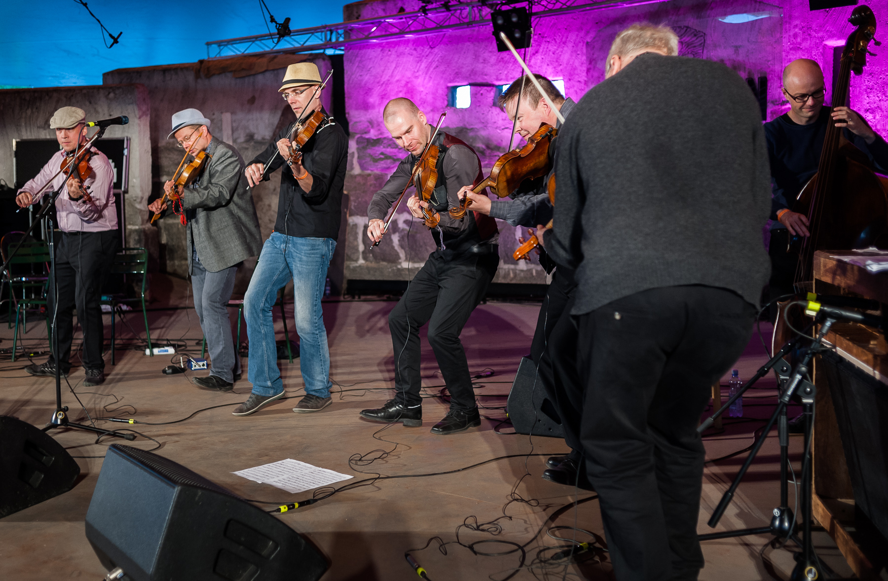 Kaustisen kansanmusiikkijuhlat 2015. JPP Areenalla. Vas. Tommi Pyykönen, Arto Järvelä, Esko Järvelä, Antti Järvelä, Matti Mäkelä, Mauno Järvelä, Timo Myllykangas.